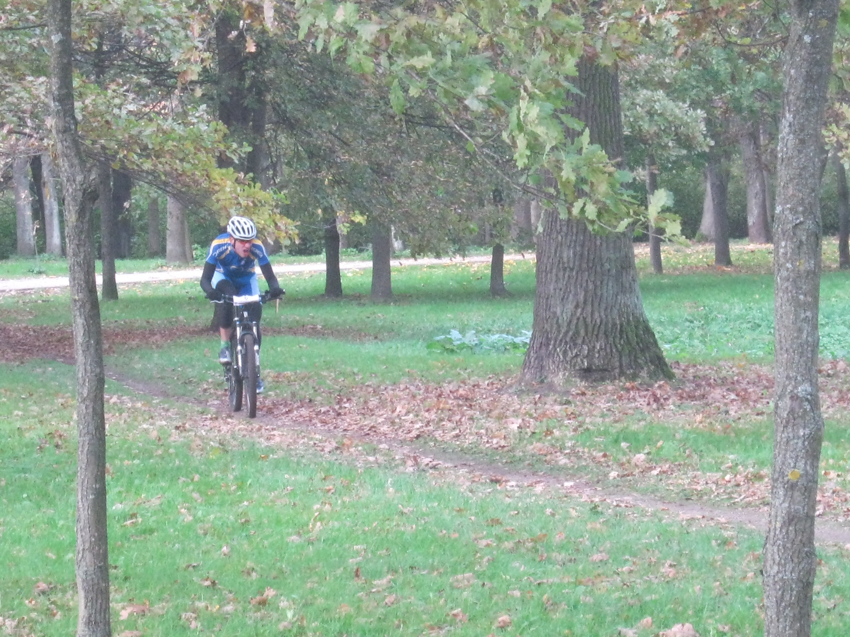 Lietuvos čempionatas. Gediminas Bagdonas